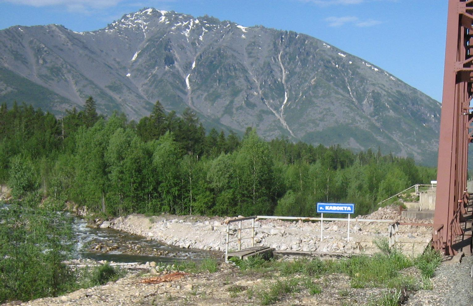 река Кавокта